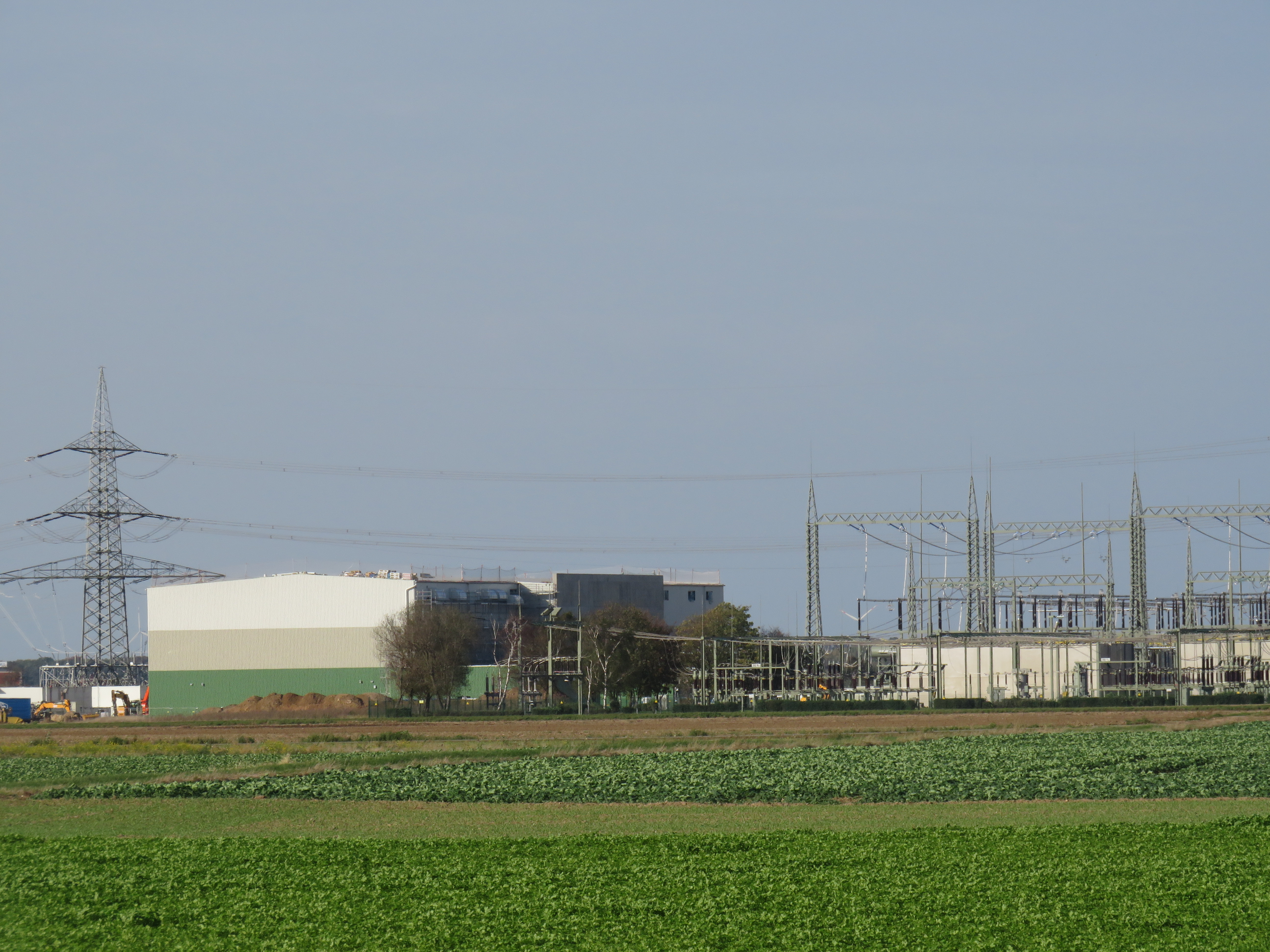 Konverterhalle des ALEGrO-Projekts des Umspannwerks Oberzier